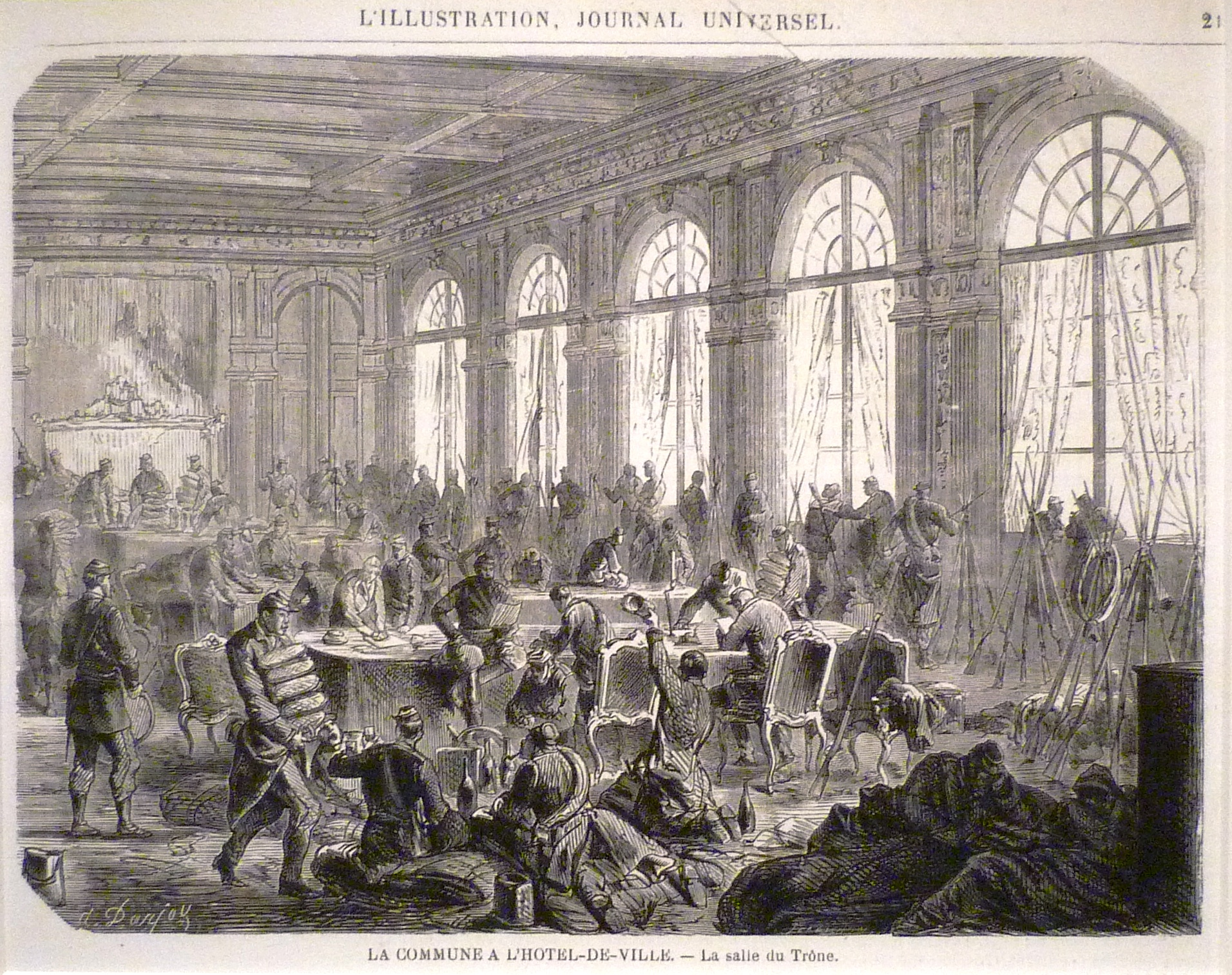 Exposition La Commune de Paris à l'Hôtel de Ville de Paris (18 mars - 28 mai 2011) - La salle du Trône de l'Hôtel de Ville - Gravure d'Alfred Darjou pour L'Illustration du 15 avril 1871.